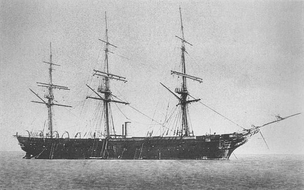 Kaiyō_Maru photograph